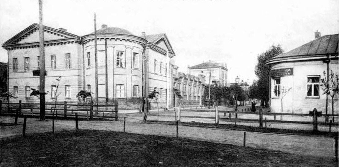 Лікарня Червоного Хреста, Харків, пл. Фейєрбаха, 5